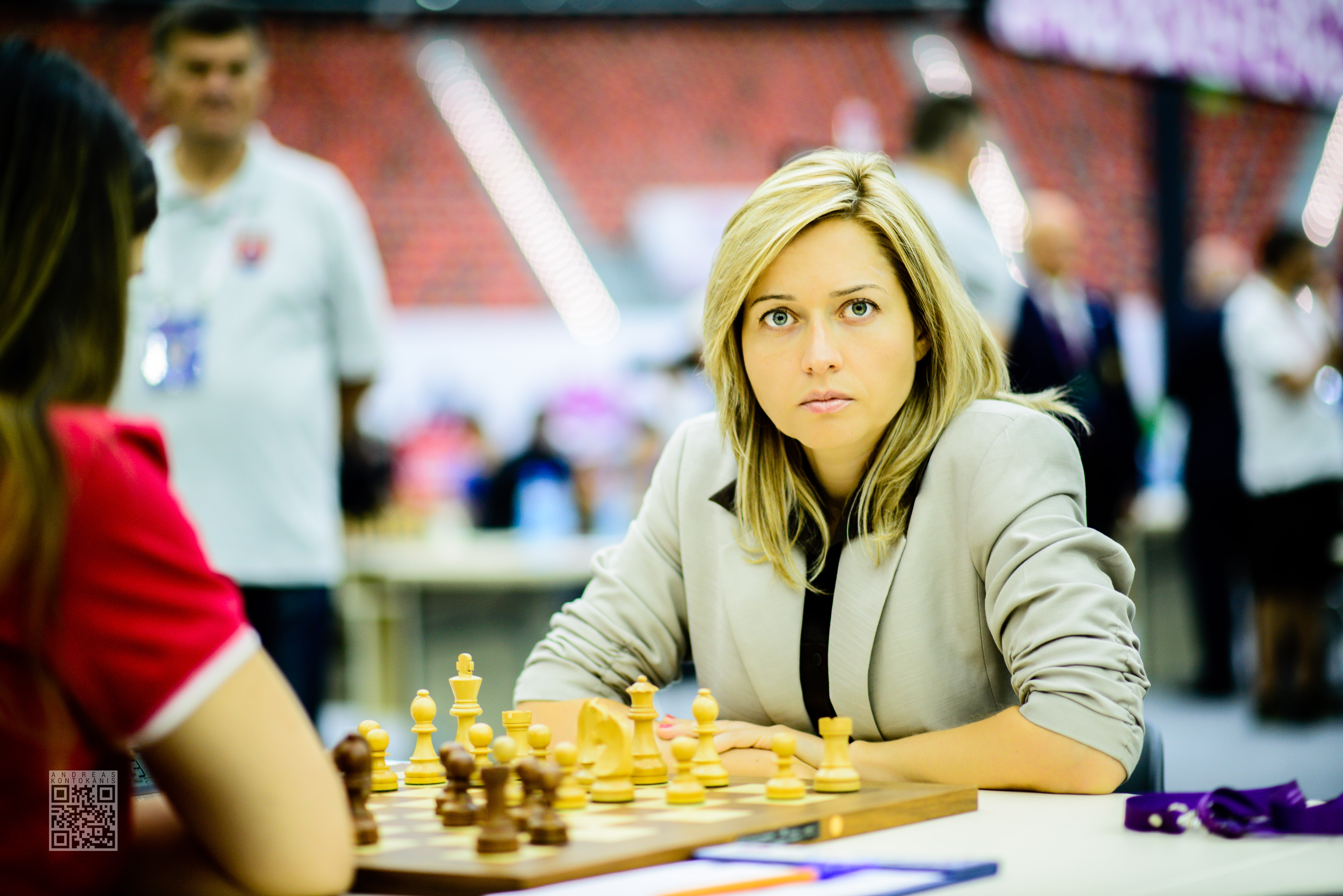 Zhukova Natalia